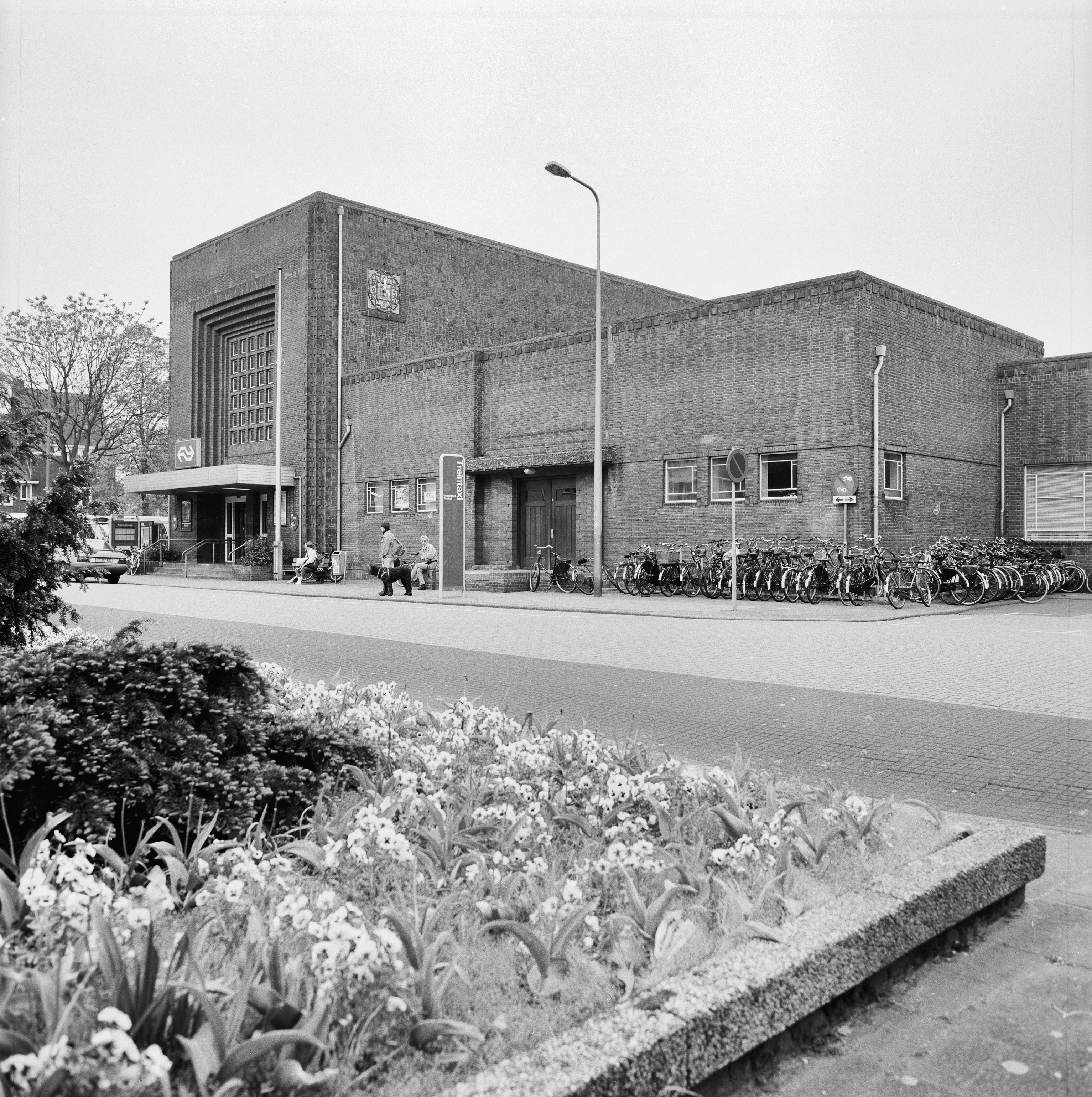 STATION: Exterieur VOORGEVEL (opmerking: Gefotografeerd voor MIP Noord-Holland)